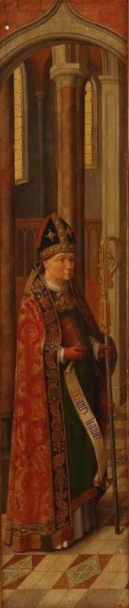 La obra representa a San Leandro de Sevilla, que fue hermano arzobispo de Sevilla y hermano de San Isidoro de Sevilla.